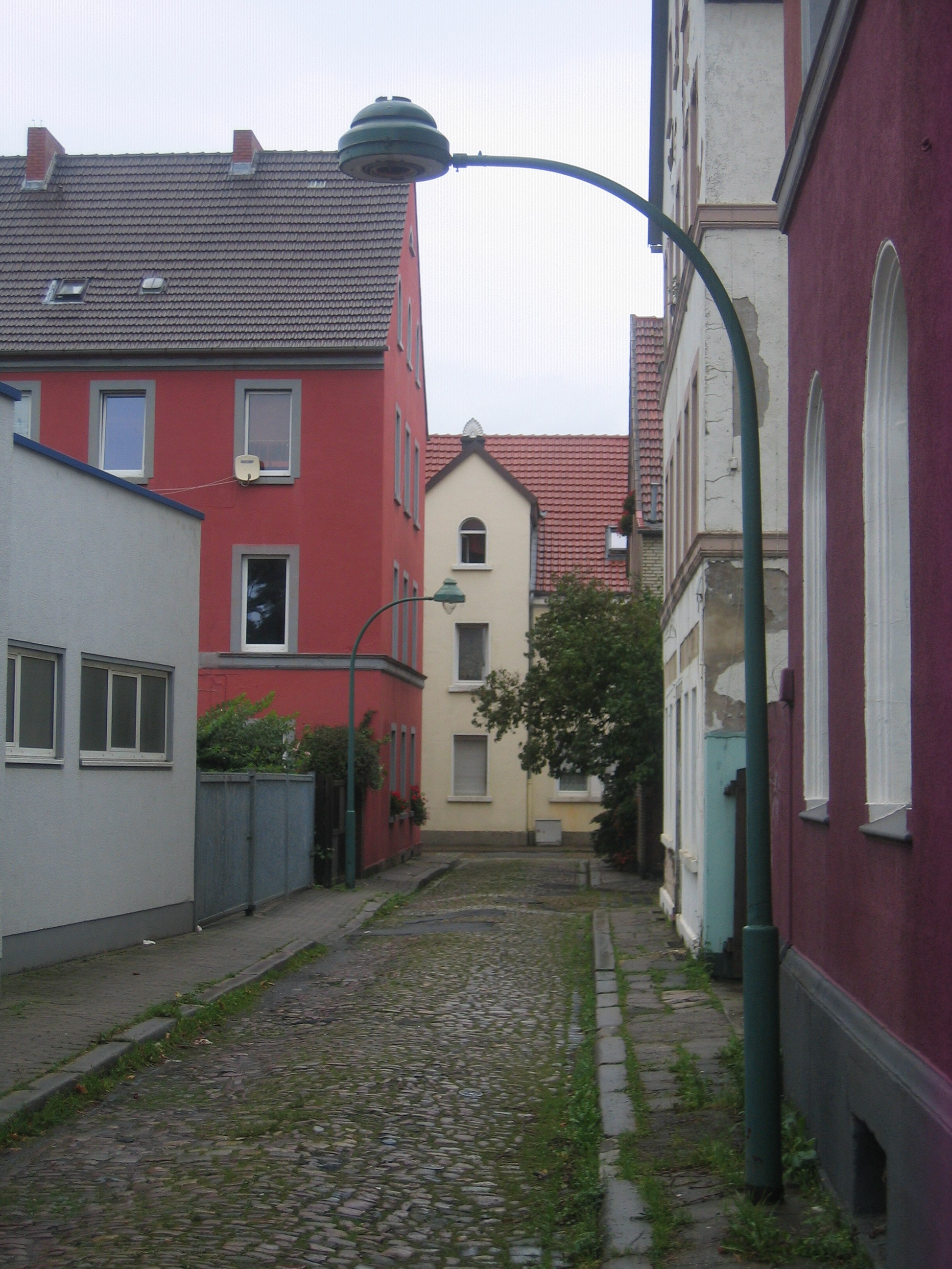 Gaslaternen in der Laxburg in Minden, Kreis Minden-Lübbecke, Nordrhein-Westfalen.